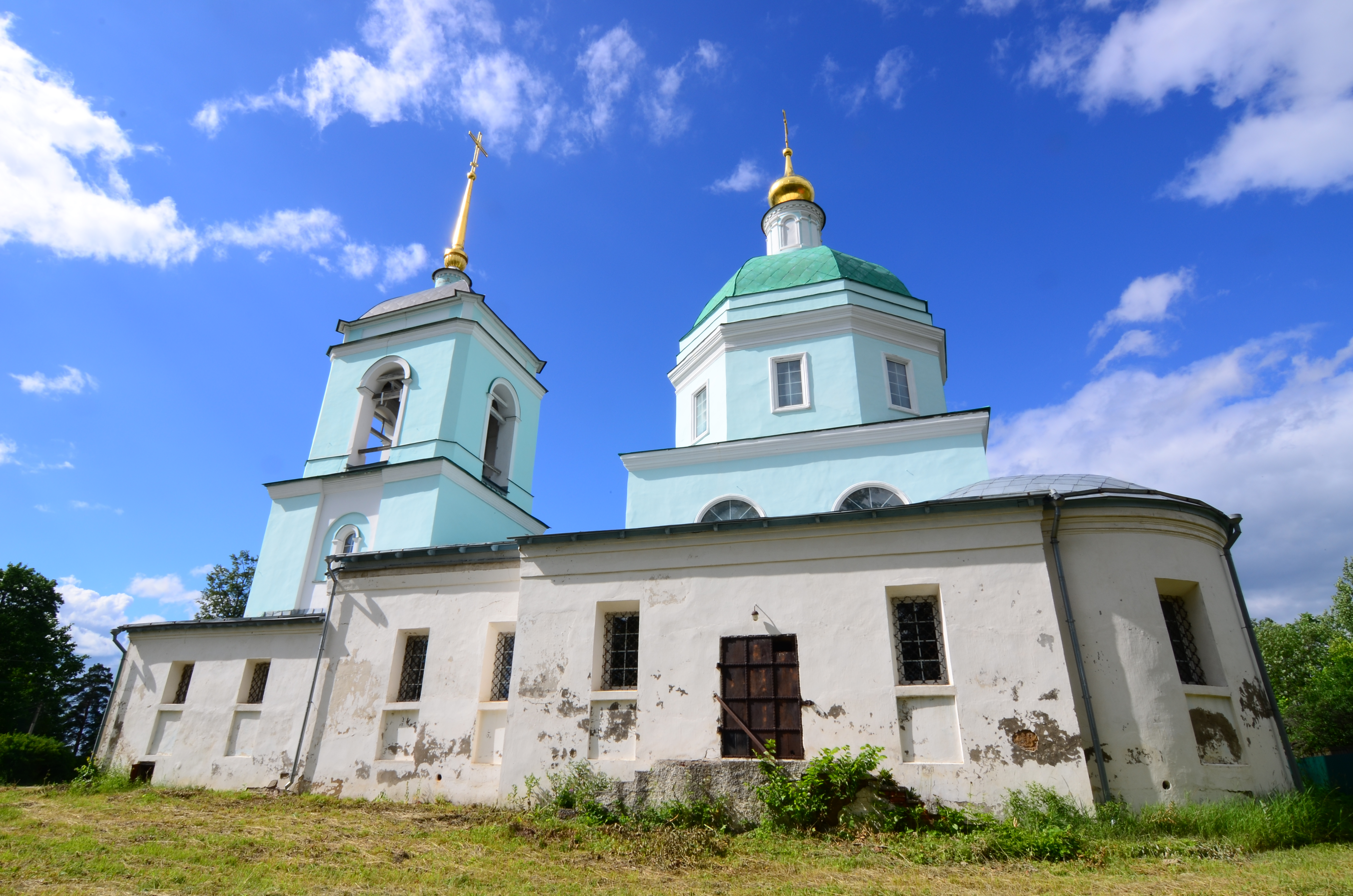 Церковь Введения во храм Пресвятой Богородицы: Ольгово, Дмитровский район, Московская область